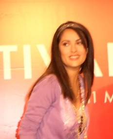 Salma Hayek